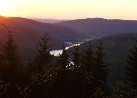 Blick auf Obernau-Talsperre (Brauersdorf/Netphen)